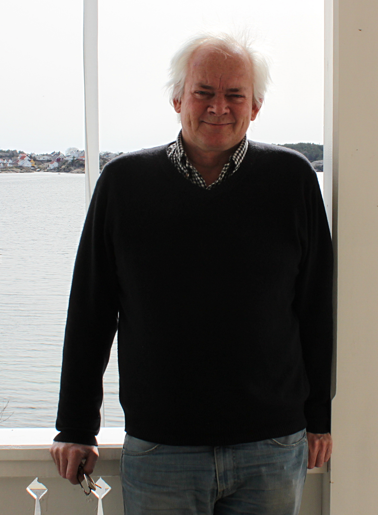 Skuespiller, forfatter og tekstforfatter Trond Brænne fotografert under en forfatterturne i Aust-Agder 2011.